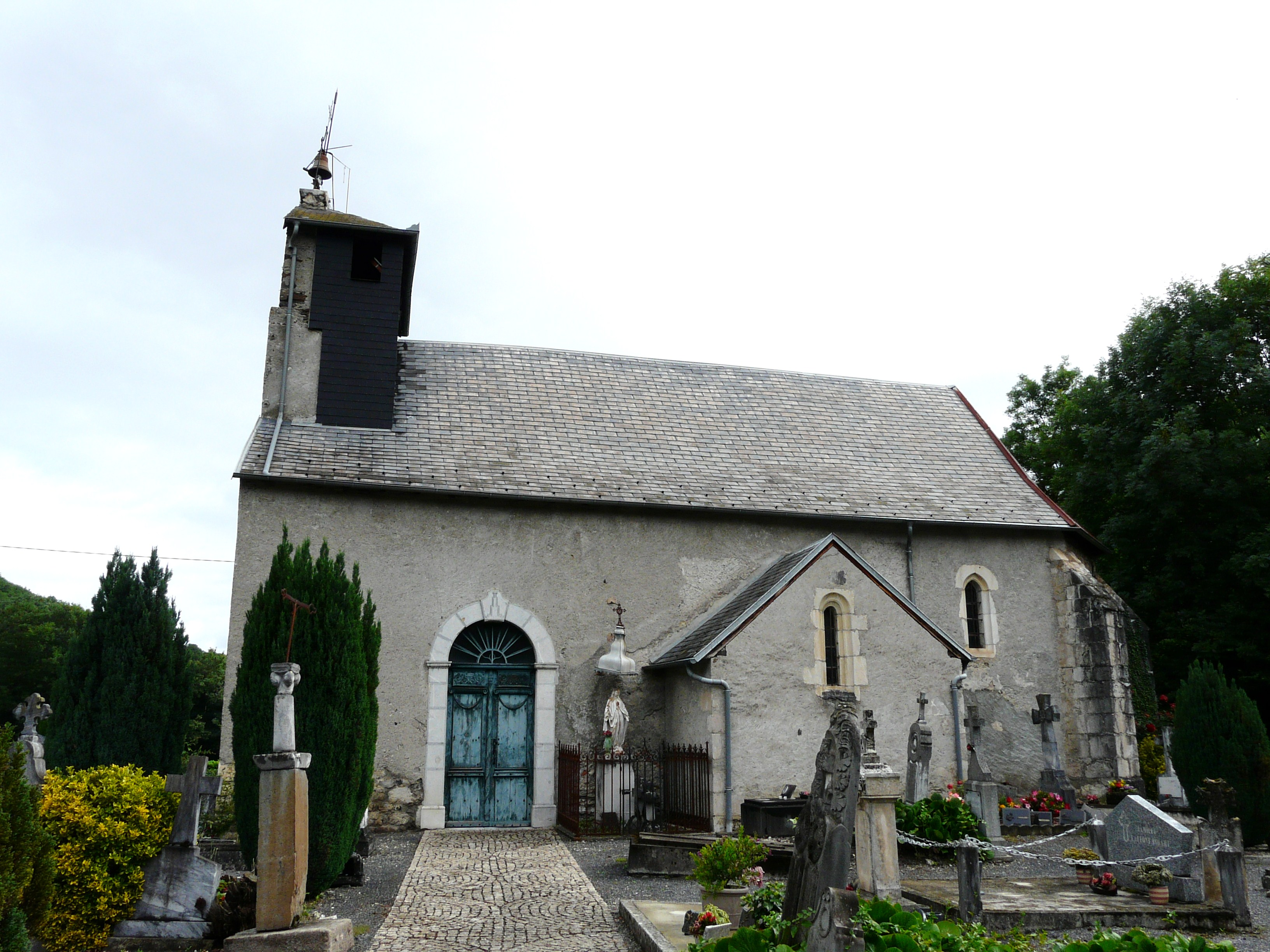 Le côté sud de l'église Saint-Hilaire de Bagiry, Haute-Garonne, France.